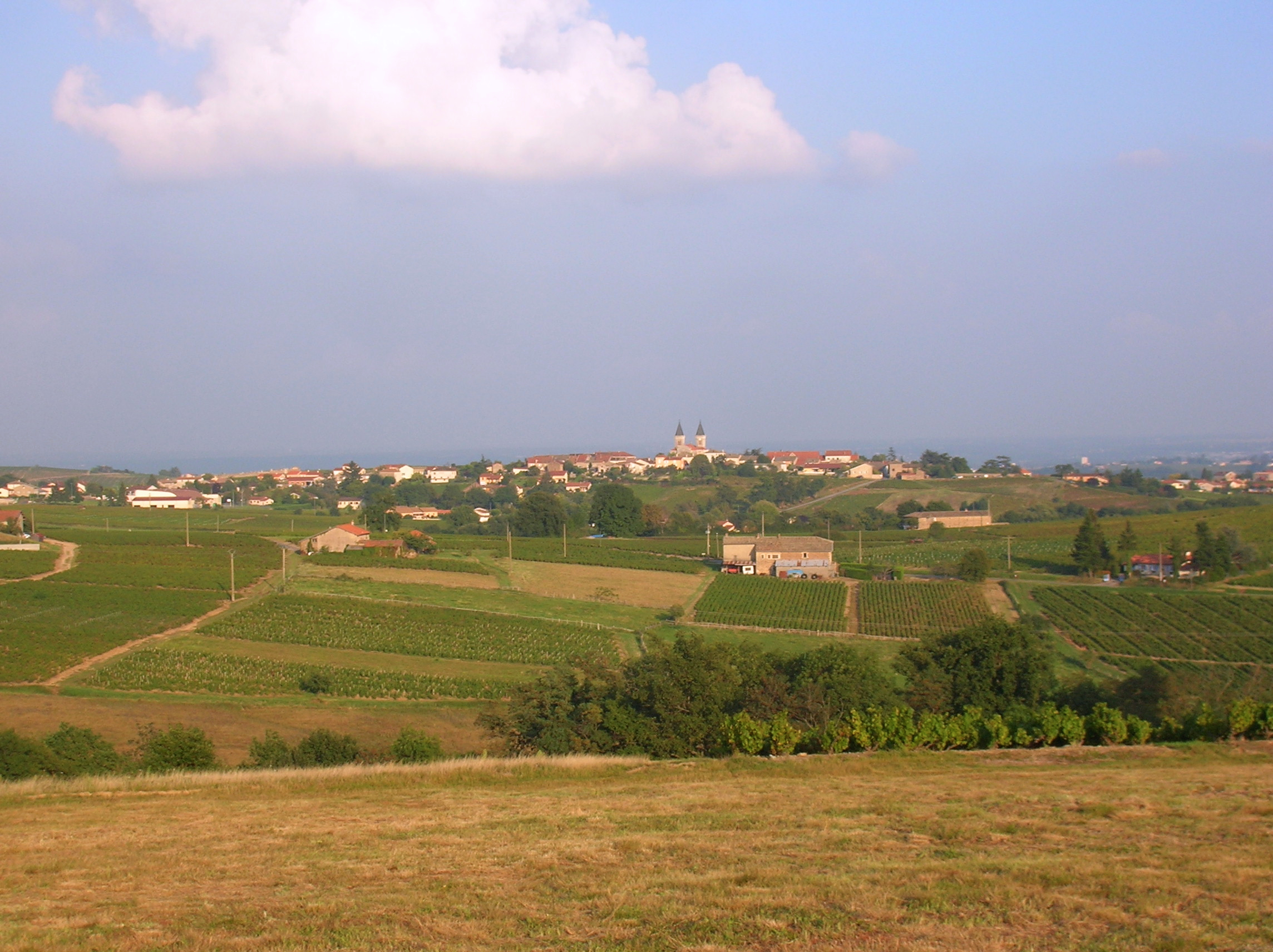 Régnié-Durette vue depuis Lantignié, Rhône, FRANCE